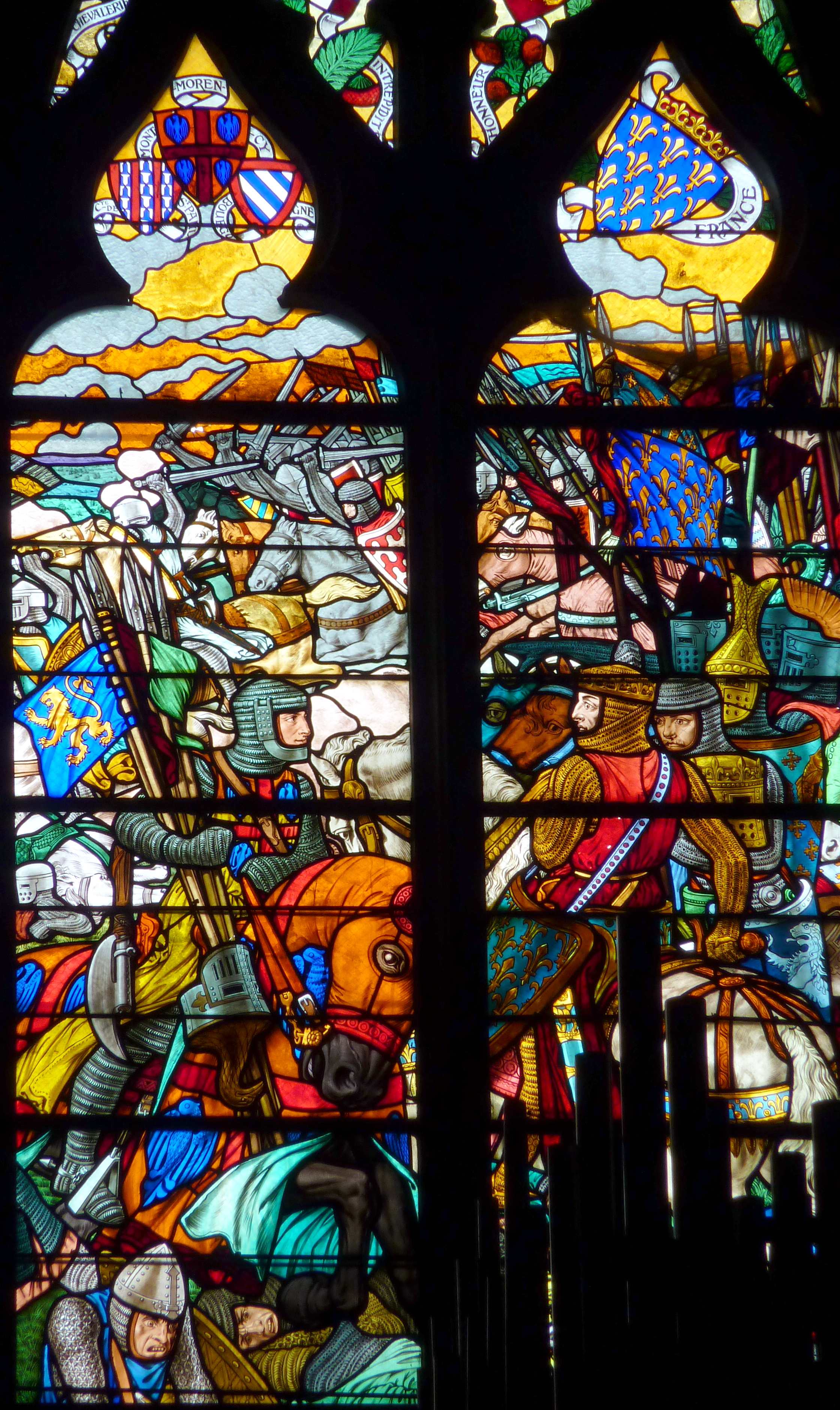 Bleiglasfenster (Ausschnitt) mit der Darstellung der Schlacht bei Bouvines (1908) in der katholischen Pfarrkirche Saint-Martin (Collégiale Saint-Martin) in Montmorency, Karton: Eugène Grasset, Ausführung: Félix Gaudin (siehe: Dominique Foussard, Charles Huet, Mathieu Lours: Églises du Val-d'Oise. Pays de France, Vallée de Montmorency, Société d'Histoire et d'Archéologie de Gonesse et du Pays de France, 2. Auflage, Gonesse 2011, ISBN 9782953155426)